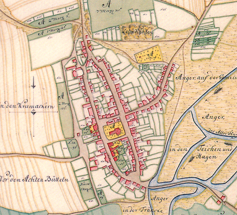 Erste Karte Vorsfeldes 1761 nach der Generallandvermessung Bedeutung der Farben: grün = Wiesen weiß = Gärten gelb = Anger (Viehweiden) hellgelb = Friedhöfe und Kirchengründstücke braun-gestreift = Ackerflächen